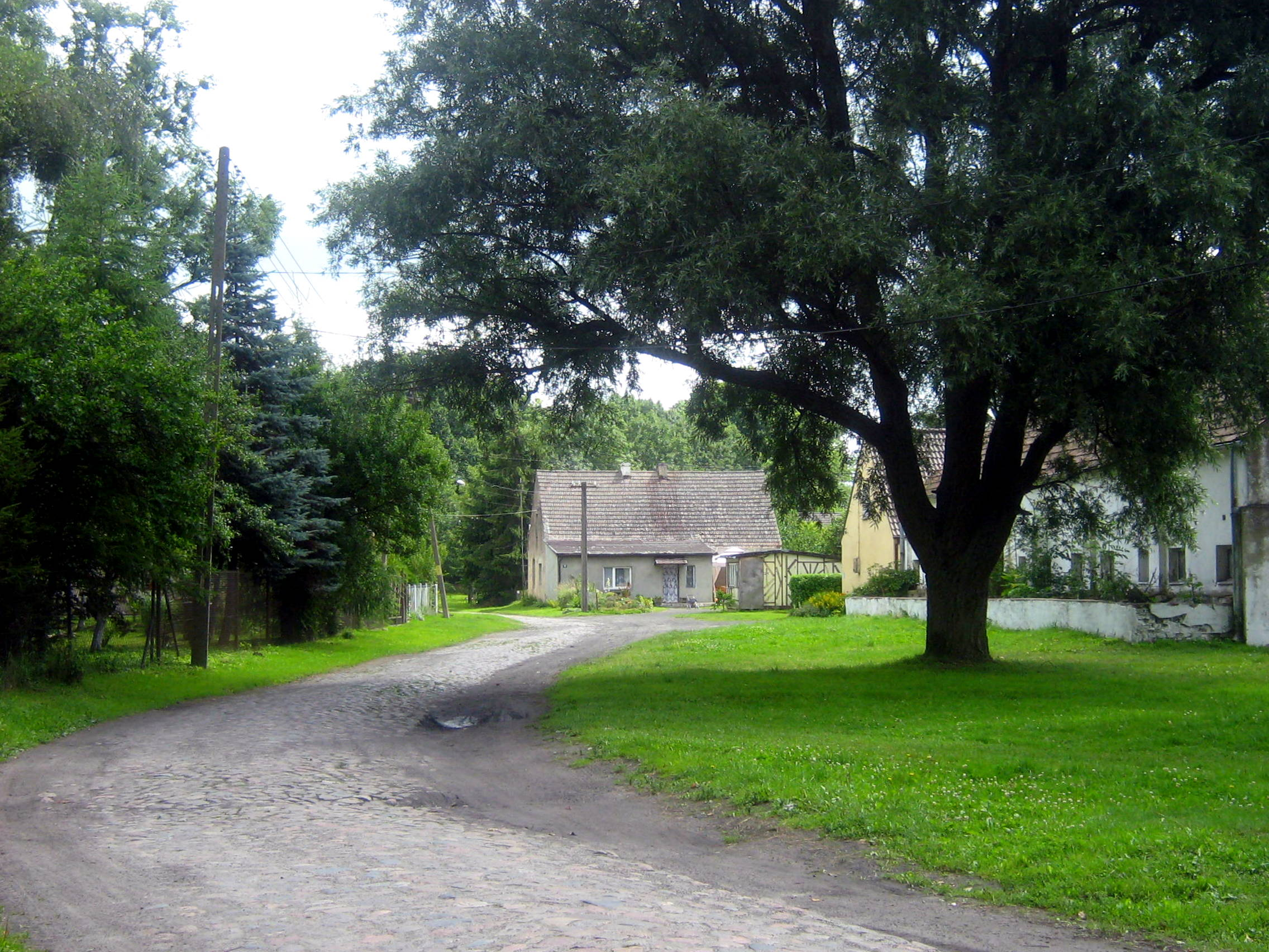 Laska (województwo zachodniopomorskie)